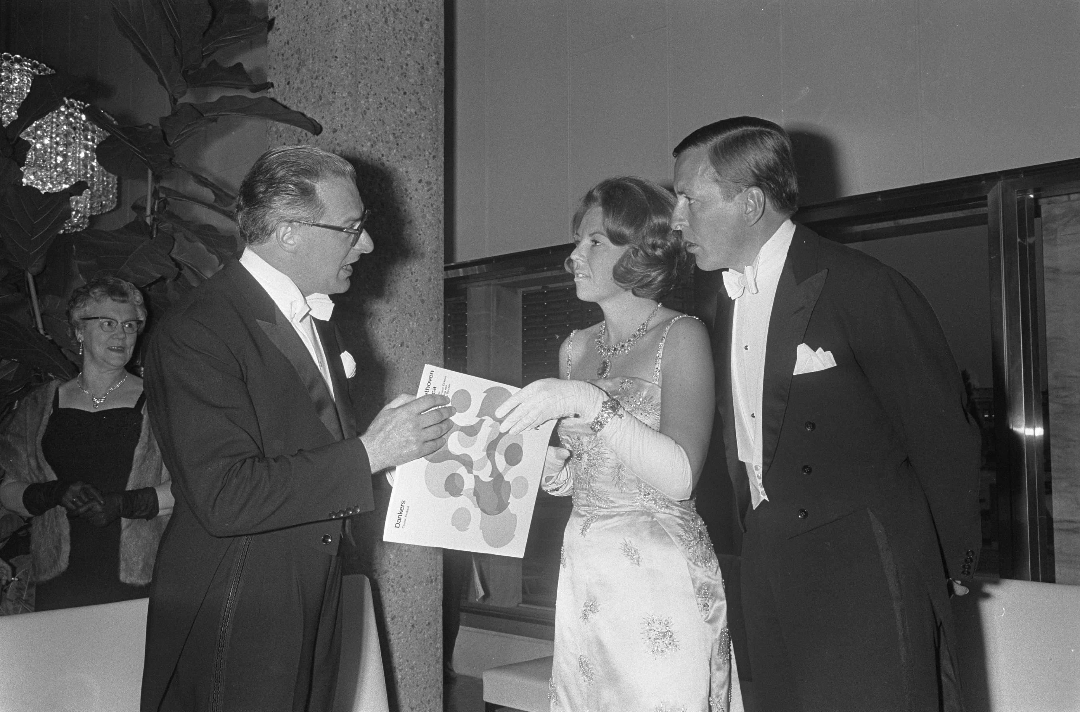 Collectie / Archief : Fotocollectie Anefo Reportage / Serie : [ onbekend ] Beschrijving : Holland Festival in De Doelen te Rotterdam van start, eregasten prinses Beatrix en Claus bij aankomst met dirigent F.P. Decker Datum : 14 juni 1966 Locatie : Rotterdam, Zuid-Holland Persoonsnaam : Beatrix, prinses, Claus, prins Instellingsnaam : Doelen, De, Holland Festival Fotograaf : Koch, Eric / Anefo Auteursrechthebbende : Nationaal Archief Materiaalsoort : Negatief (zwart/wit) Nummer archiefinventaris : bekijk toegang 2.24.01.05 Bestanddeelnummer : 919-2479